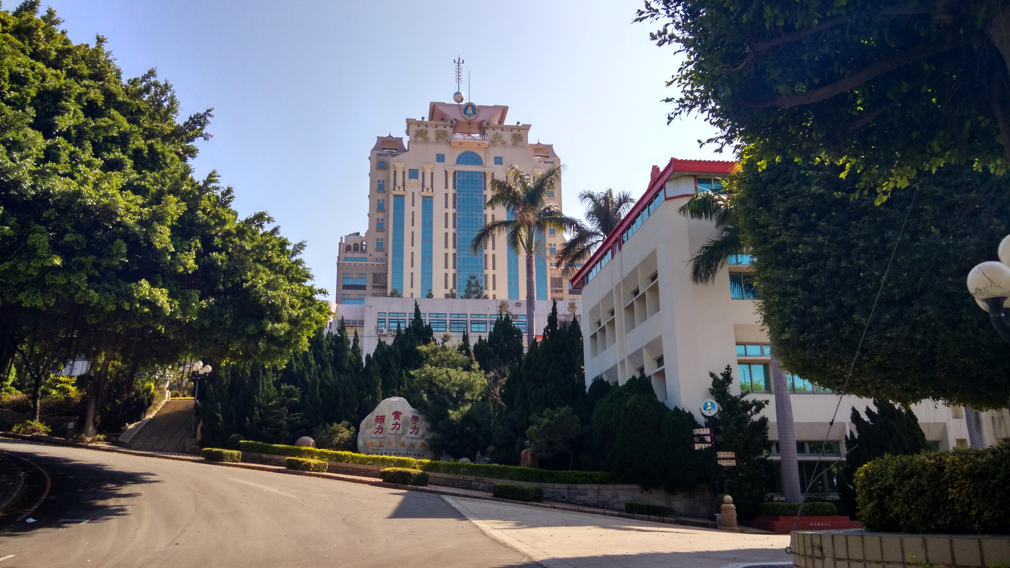 中文（台灣）: 建國科大校園一景